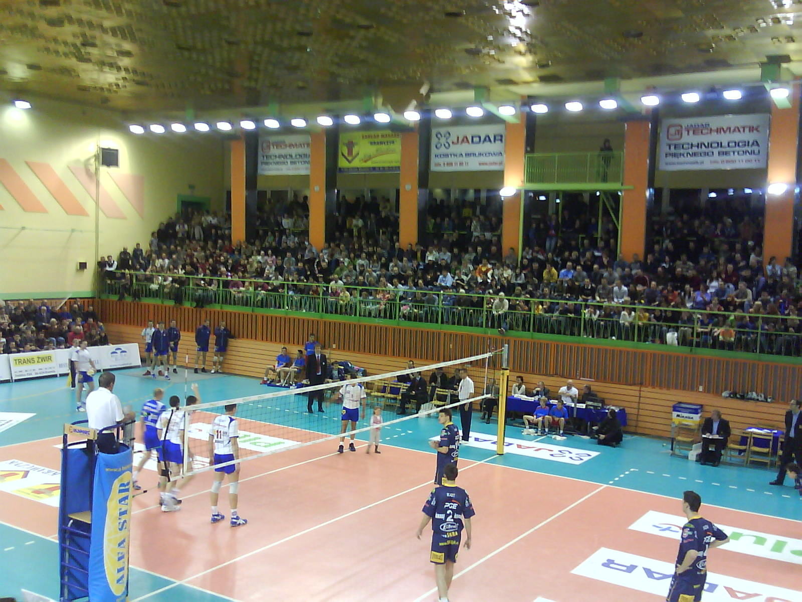 Hala MOSiR w Radomiu; Hall MOSiR in Radom